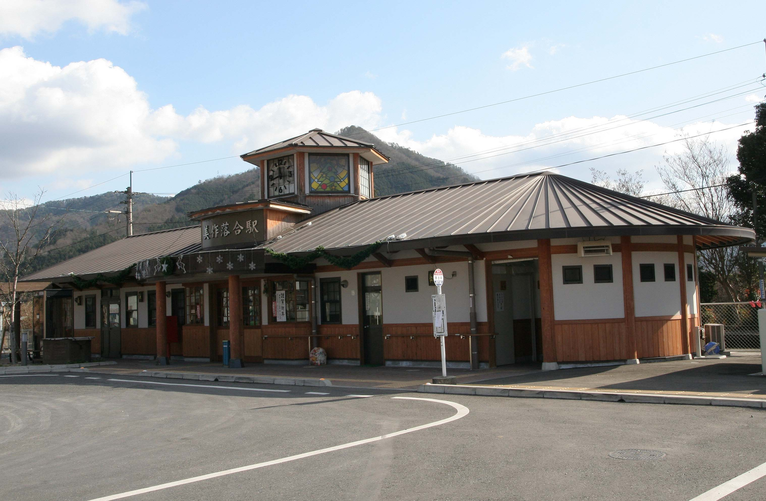 美作落合駅の駅舎